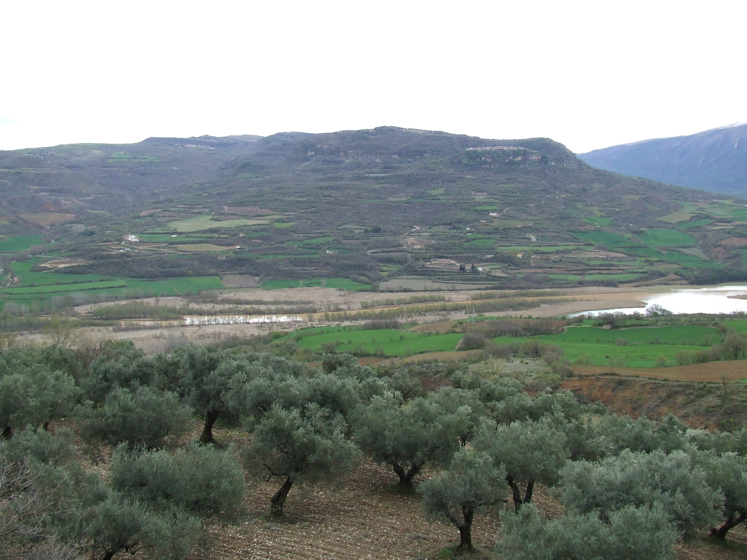 El terme de Llimiana des de ponent (Pallars Jussà)